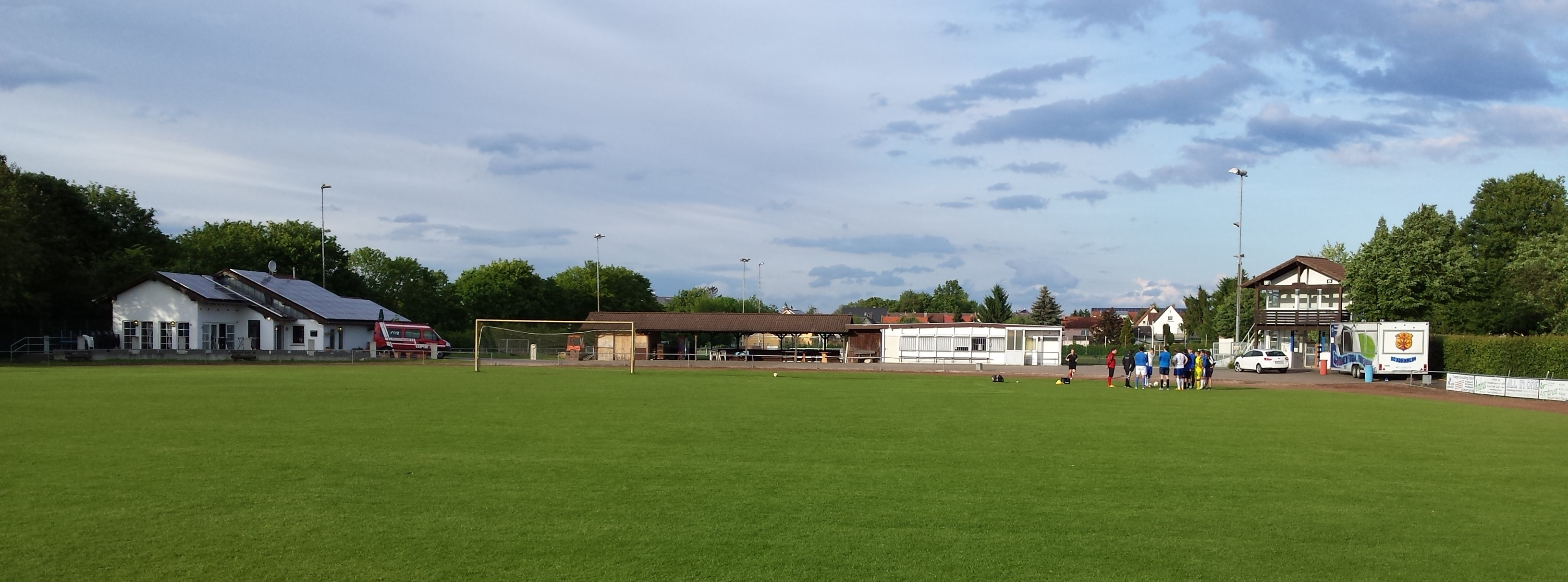 Riedsportfeld mit Blick in östliche Richtung